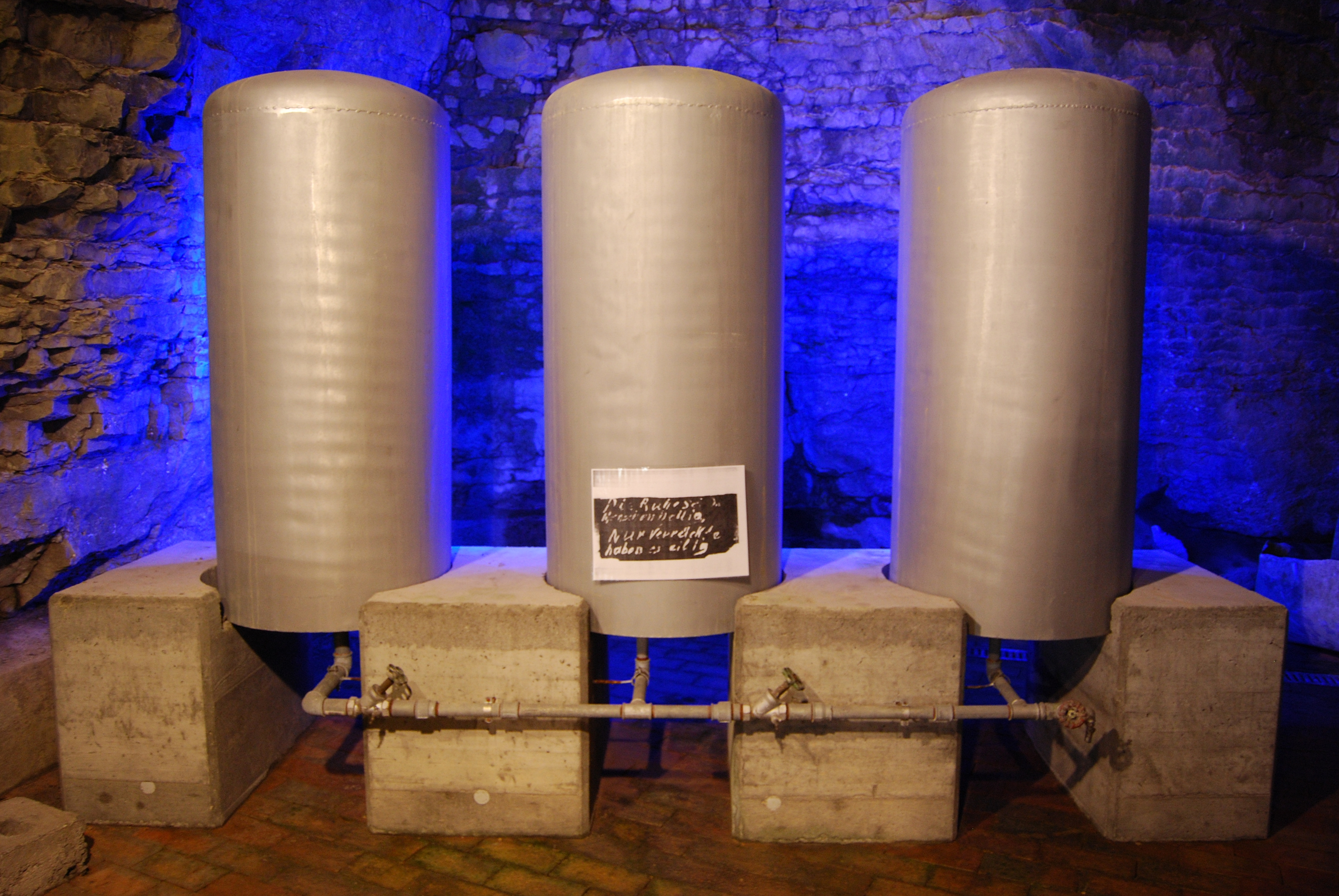 Nachbildungen der drei Schwerwassertanks des Reaktors Haigerloch, aufgestellt im Atomkeller-Museum. Fotografiert ohne Blitz. Die Original-Aufschrift lautet "Die Ruhe sei dem Menschen heilig, denn nur verrückte habens eilig".